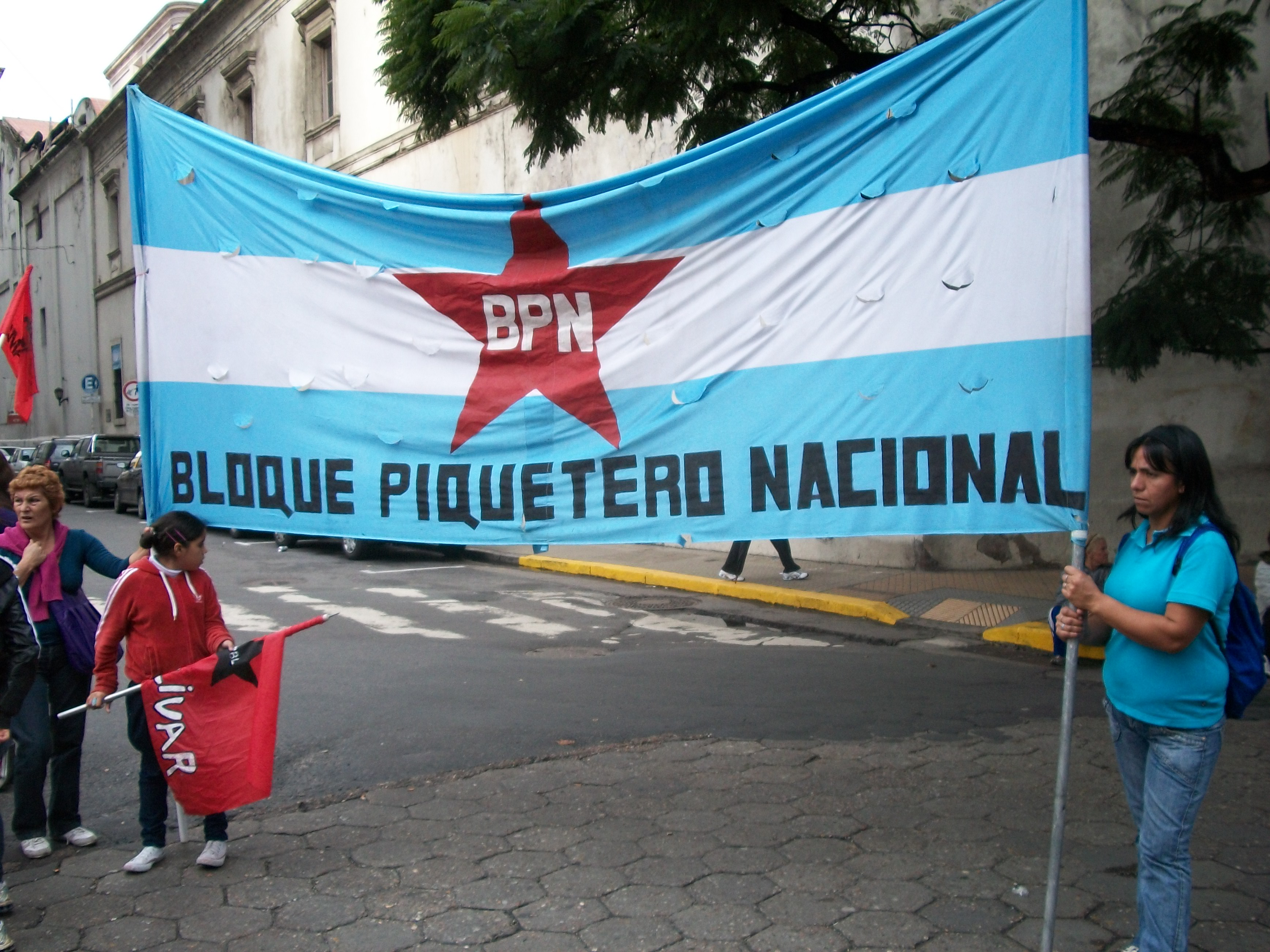 Bicentenario de Argentina